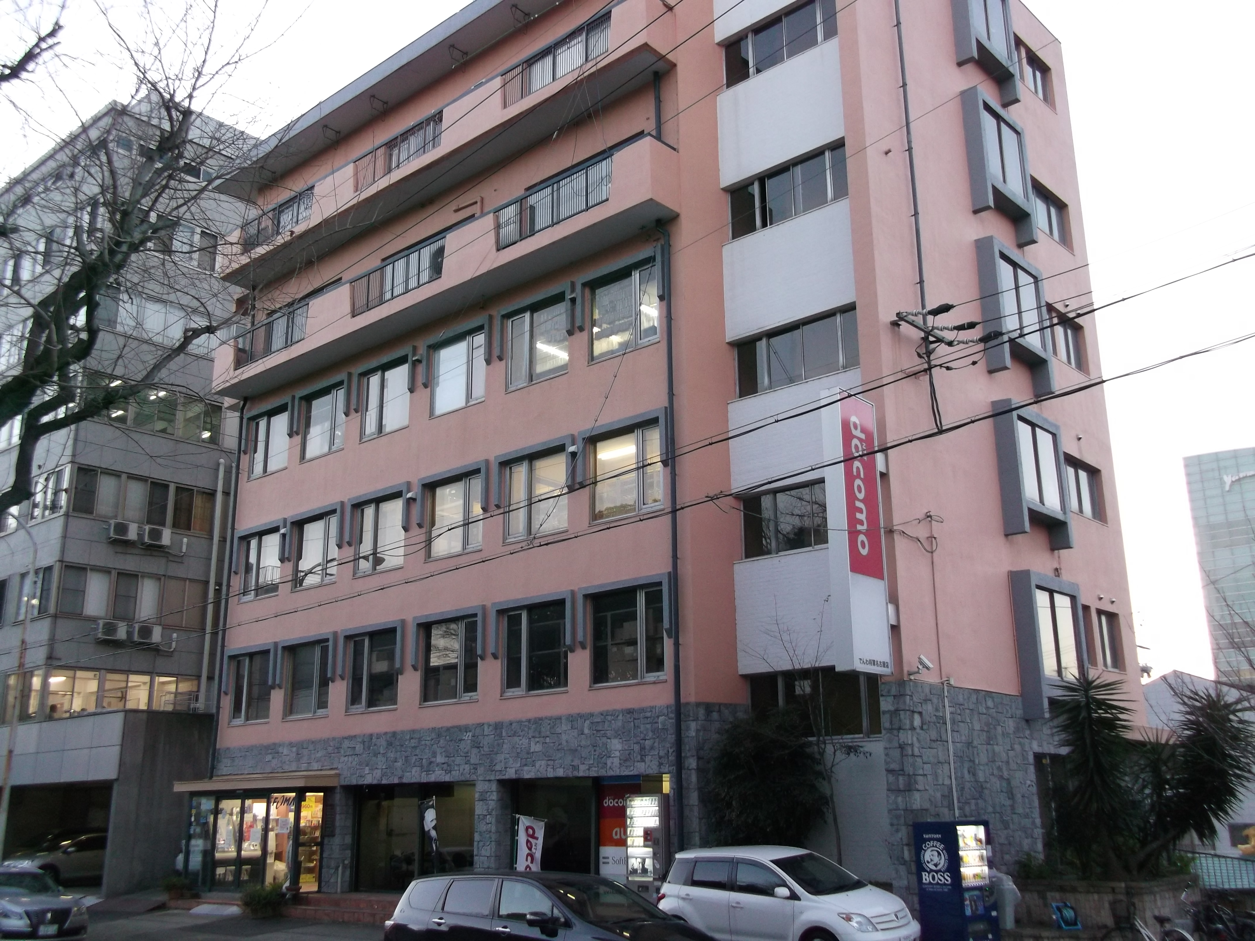 名古屋市中区三の丸にあるラスタバナナ本社を北東側から写す